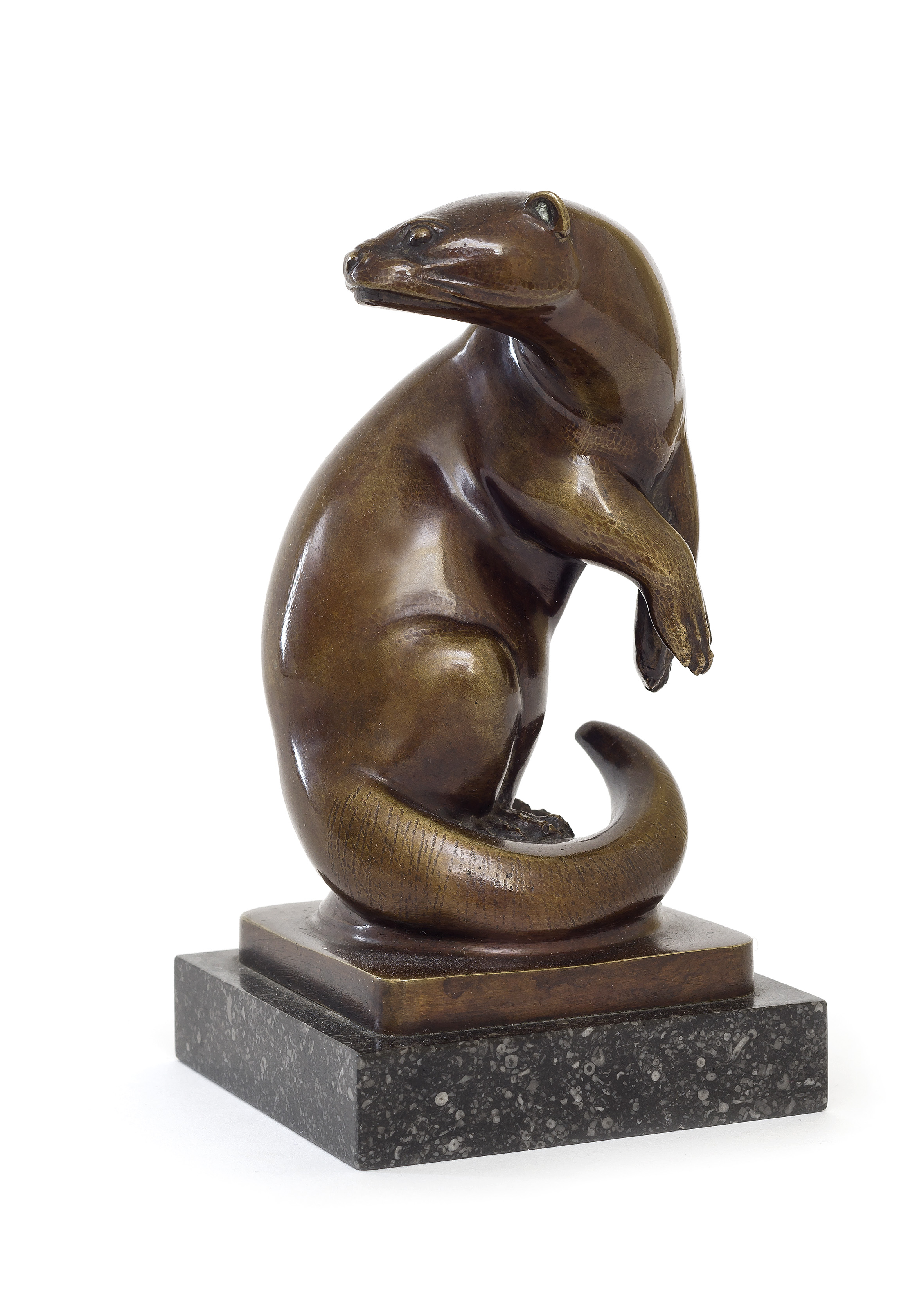 Bronze Fischotter von Max Esser, 1925, Bronze, Höhe 13 cm (mit Sockel 15 cm)